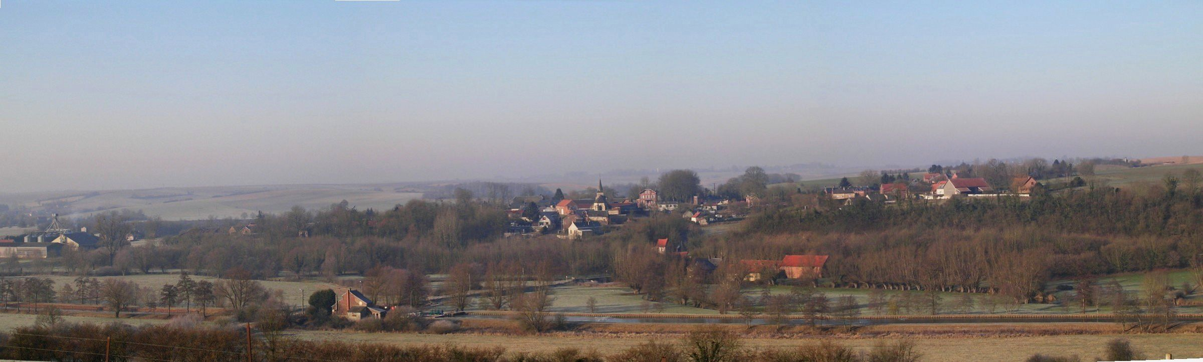 vue d'ensemble du village